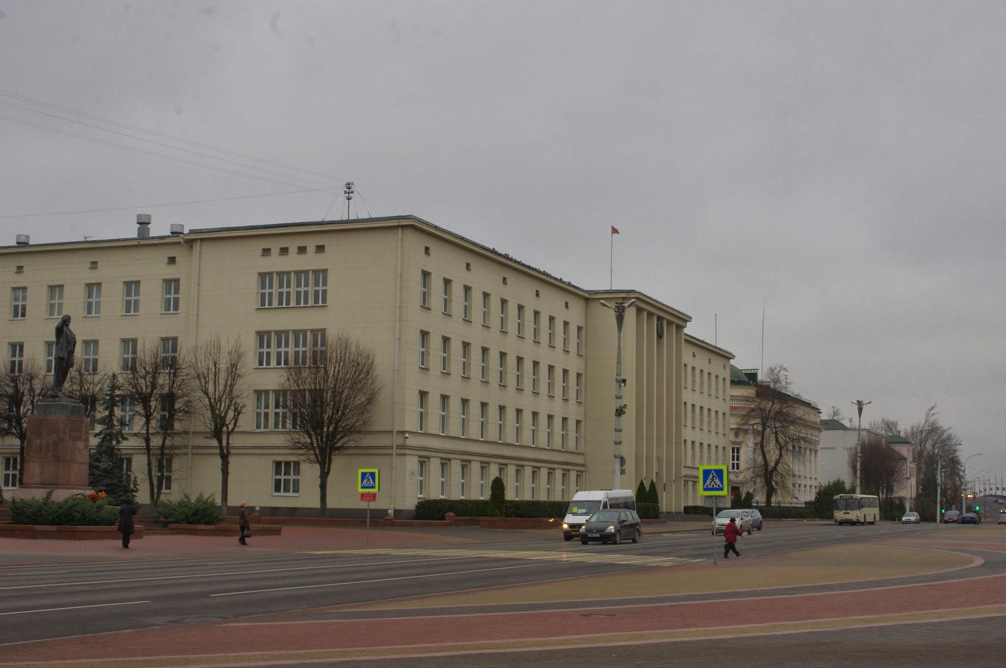 Lieninski rajon, Brest, Belarus